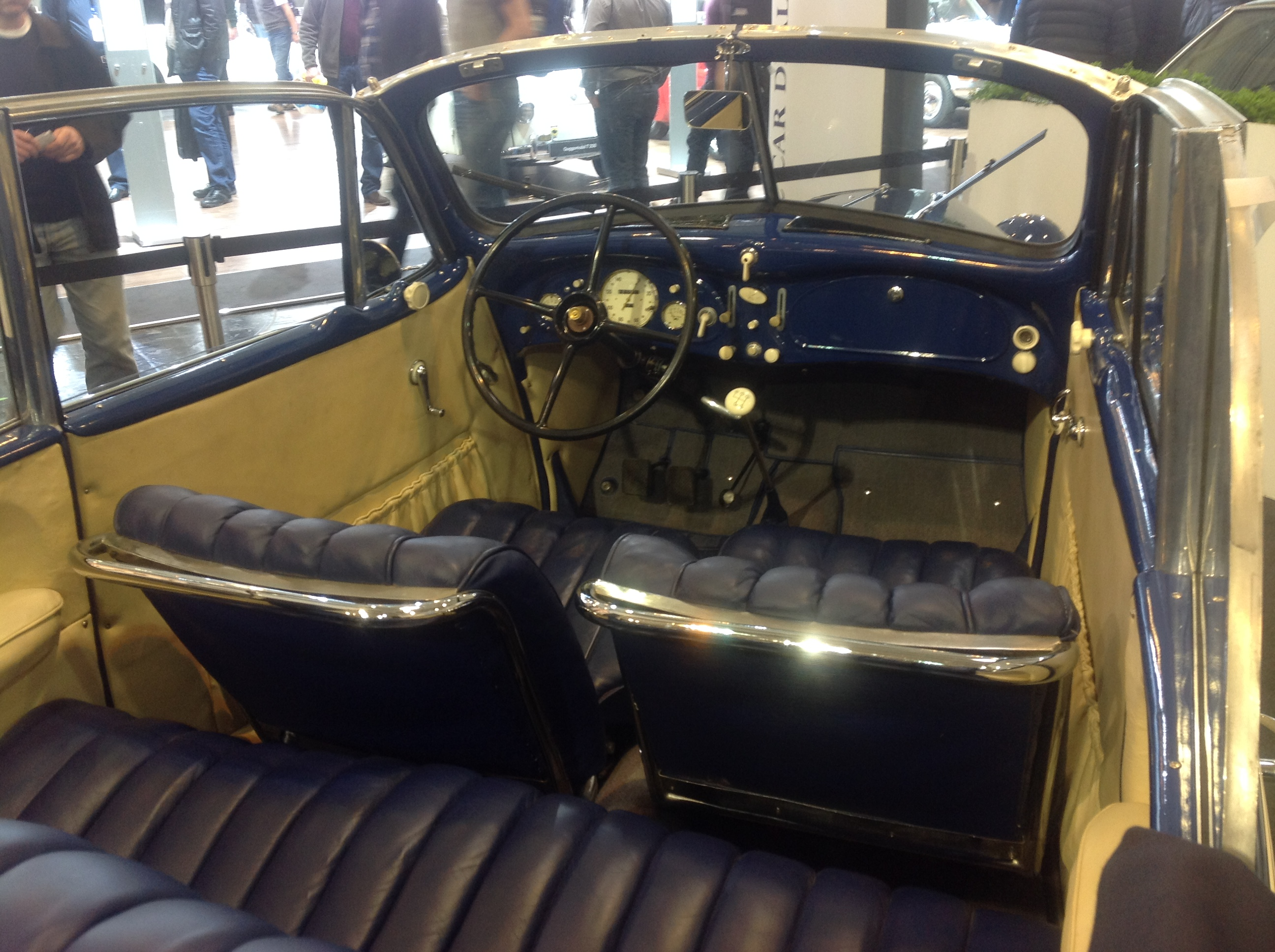 BMW 320 Kabriolett